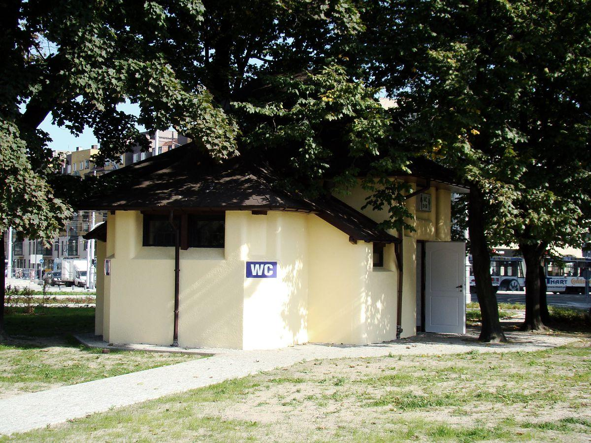 Szalet po remoncie w nowej szacie.